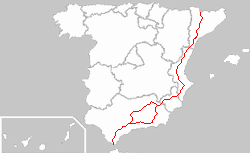 Mapa del recorrido del sendero GR-7